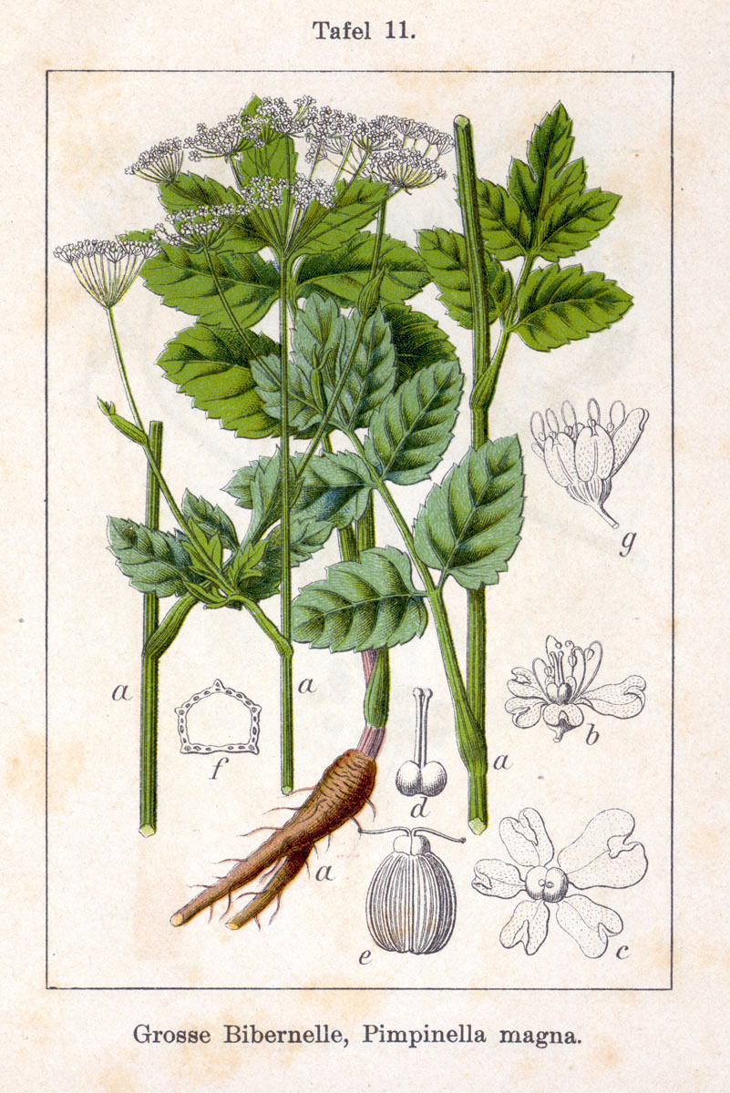 Pimpinella major (L.) Huds., syn. Pimpinella magna L. Original Description Groesse Bibenelle, Pimpinella magna